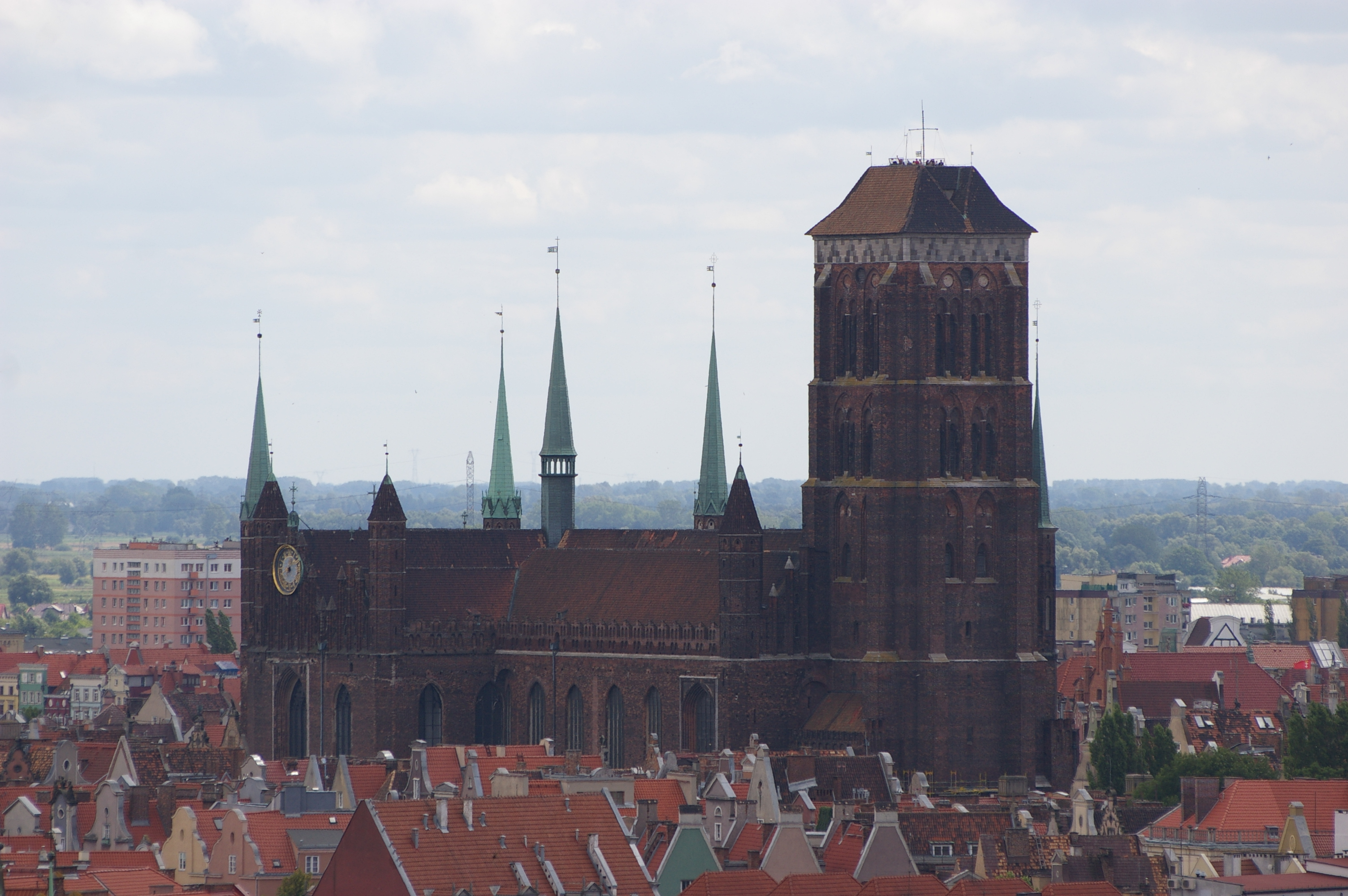 Bazylika Mariacka widziana z Góry Gradowej